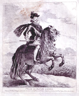 Grabado del retrato ecuestre de Felipe III de España, realizado por Diego Velázquez.